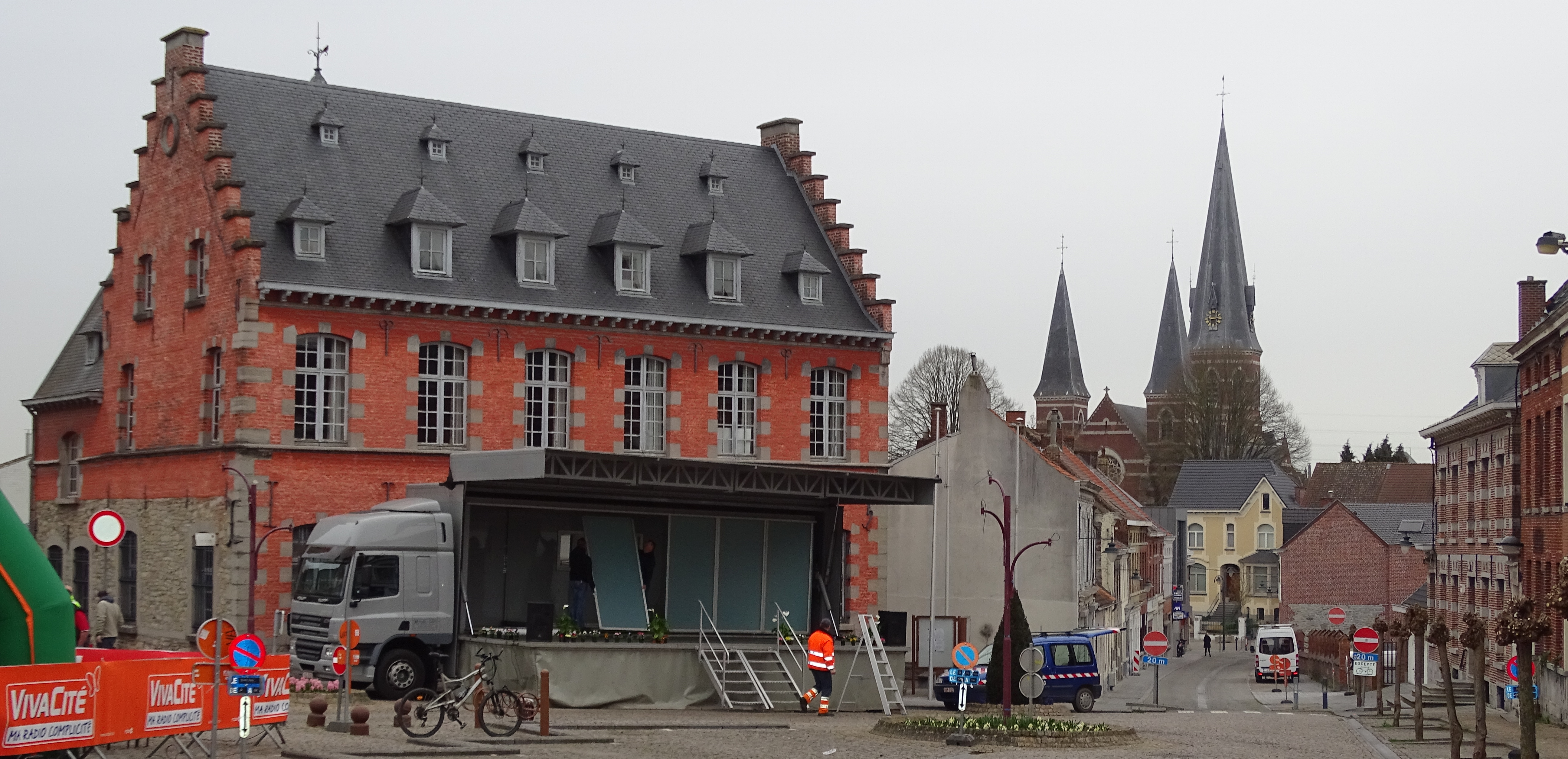 Triptyque des Monts et Châteaux 2015